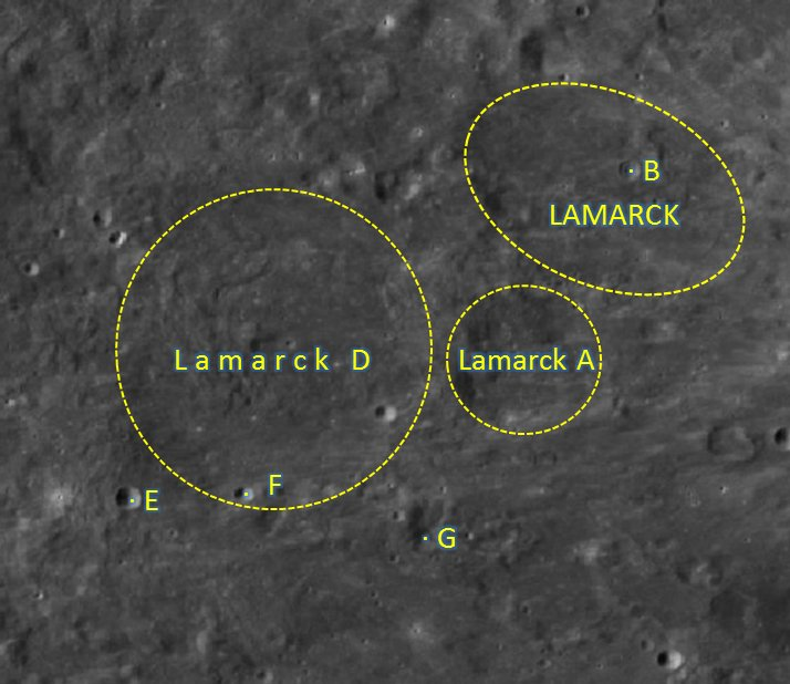 Cráter lunar Lamarck. Cráteres satélite. (Imagen LRO)